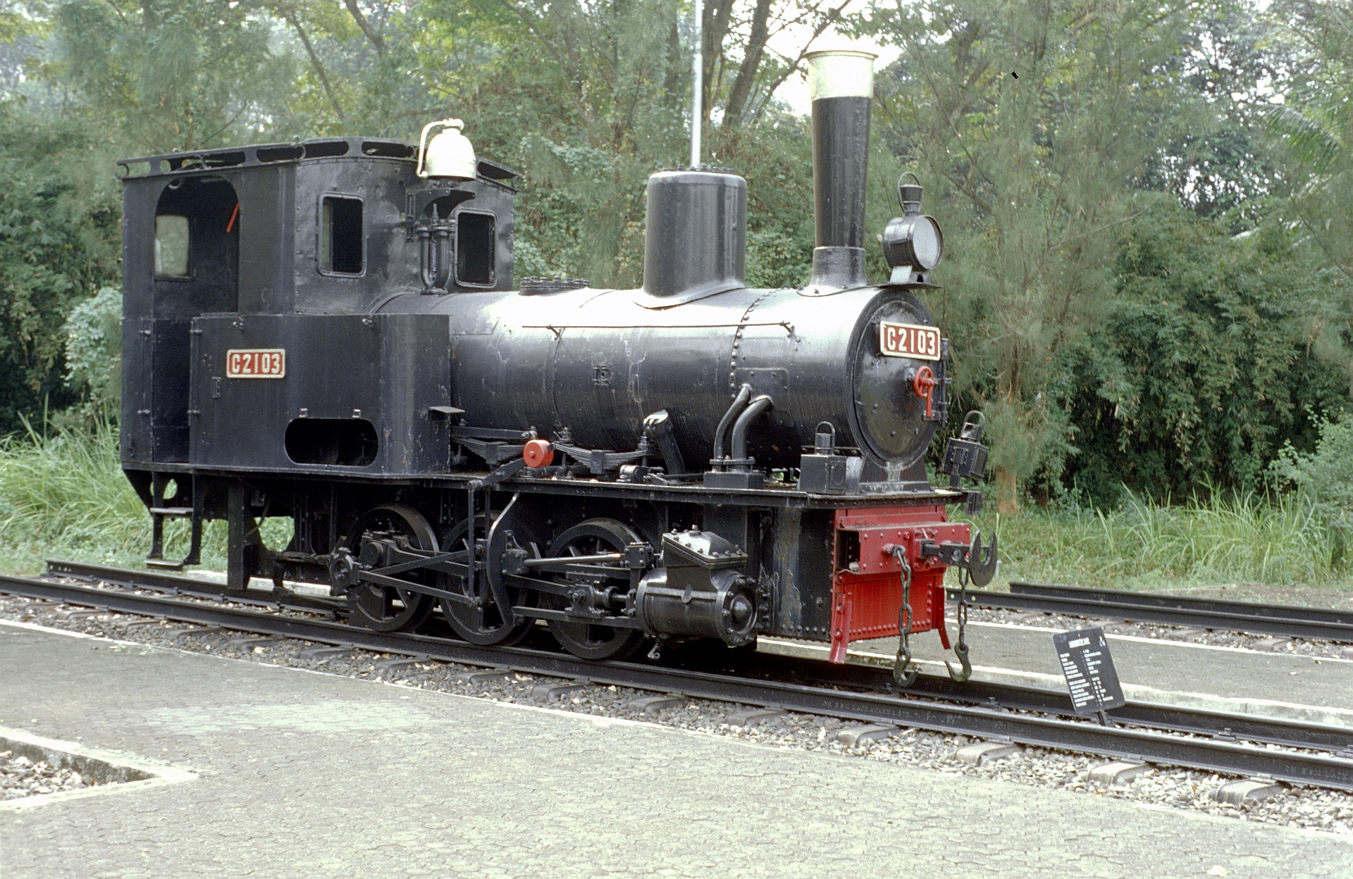 DKA C21 (21 03 A)